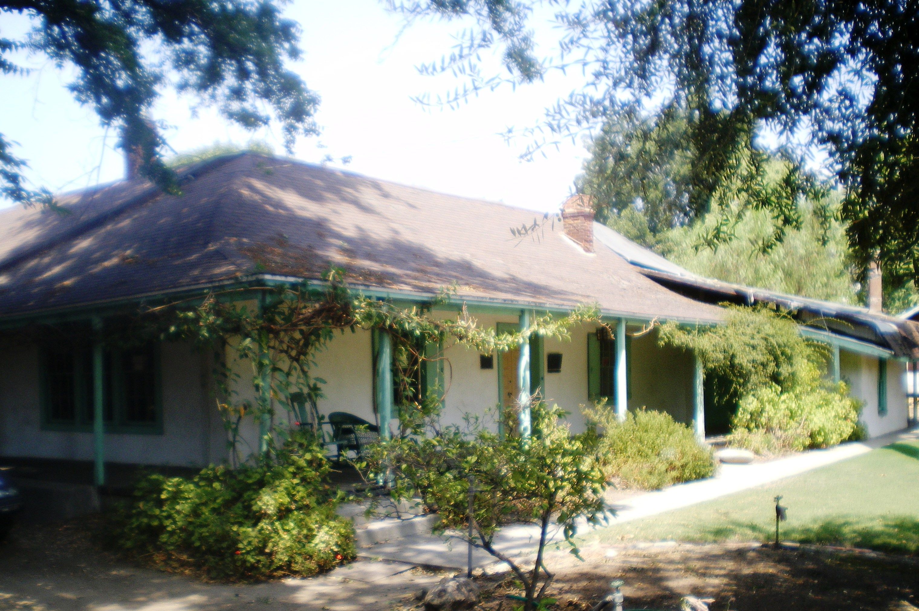 La Casa Alvarado, 1459 Old Settlers Lane, Pomona, California